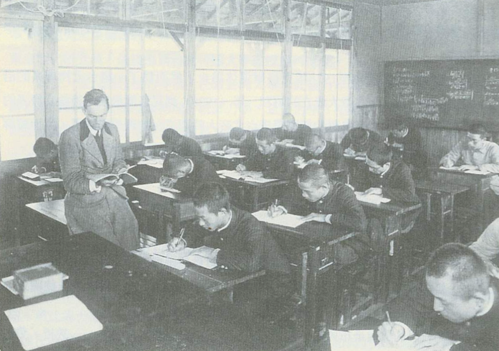 克洛爾早期（1945年前）教書情形